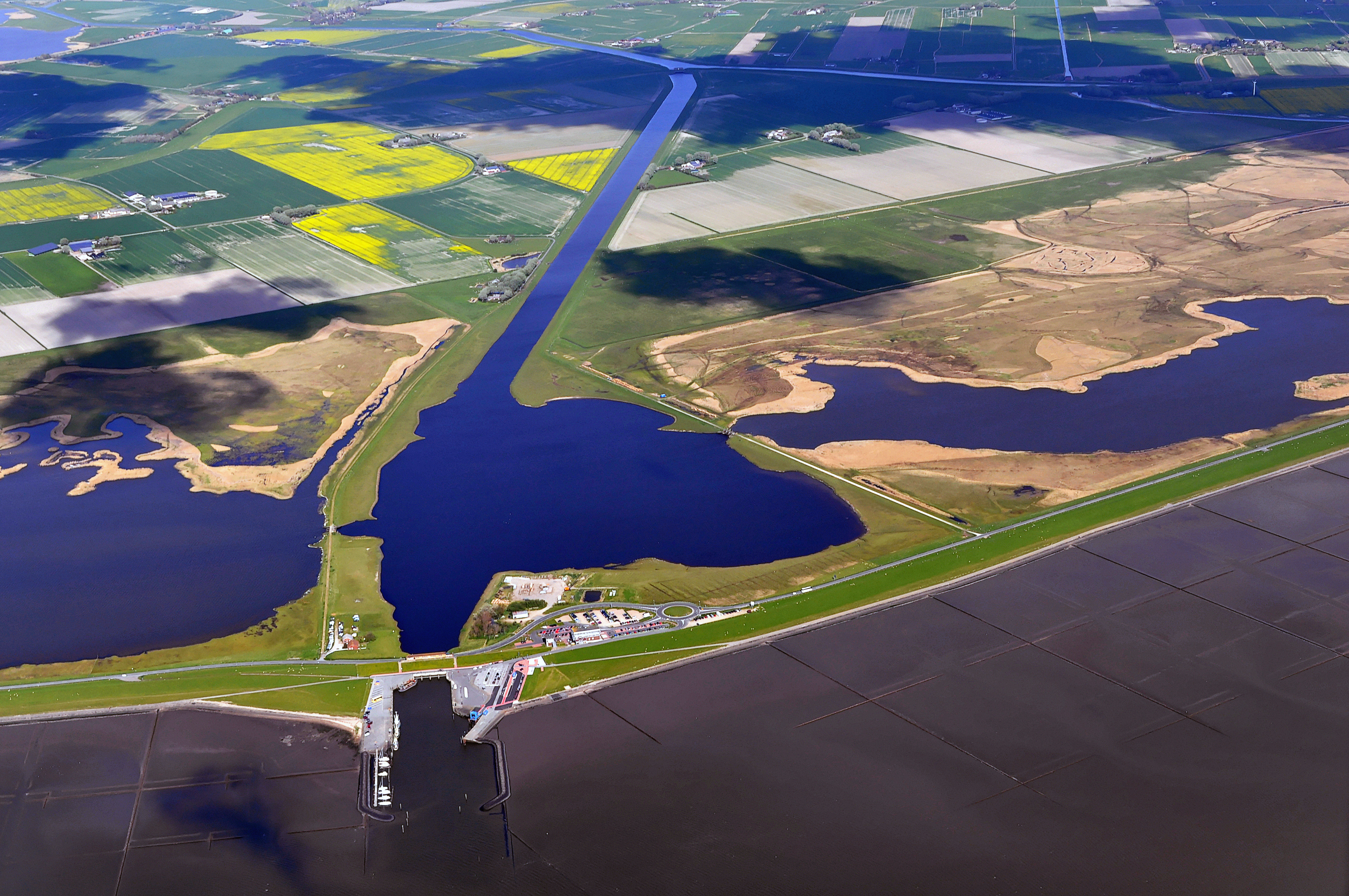 Luftbilder von der Nordseeküste 2012-05